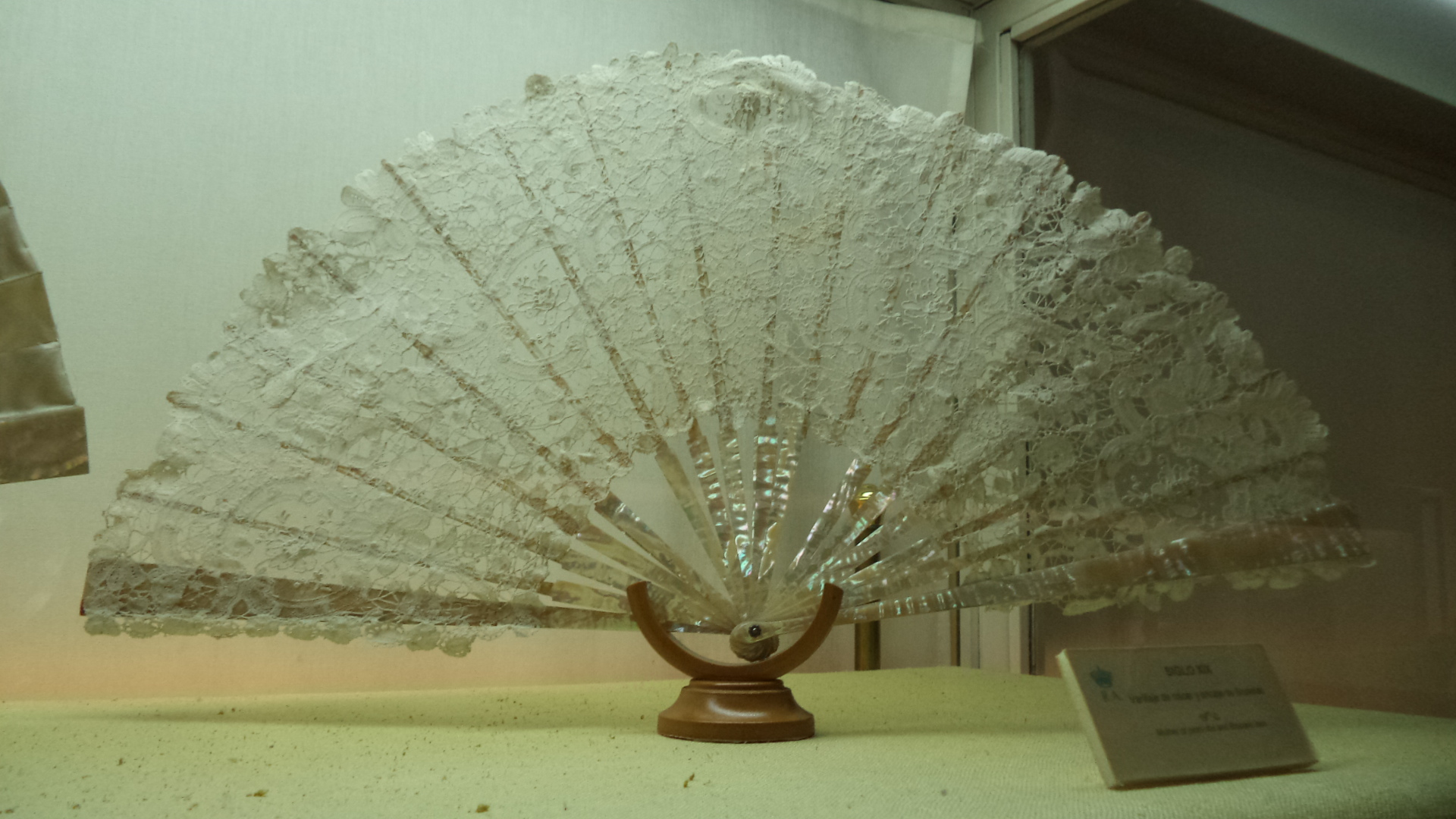 Abanico de nácar y encaje. Sala de los abanicos del Real Alcázar de Sevilla. Donación realizada a la ciudad por Gloria Trueba Gómez en 1997.